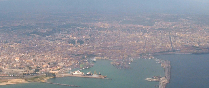 Panorama aereo di Catania. Particolare da un file di Commons. Realizzata da Utente Flickr il 27 dicembre 2005